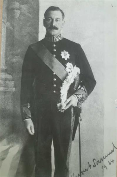 ירושלים - הרברט סמואל